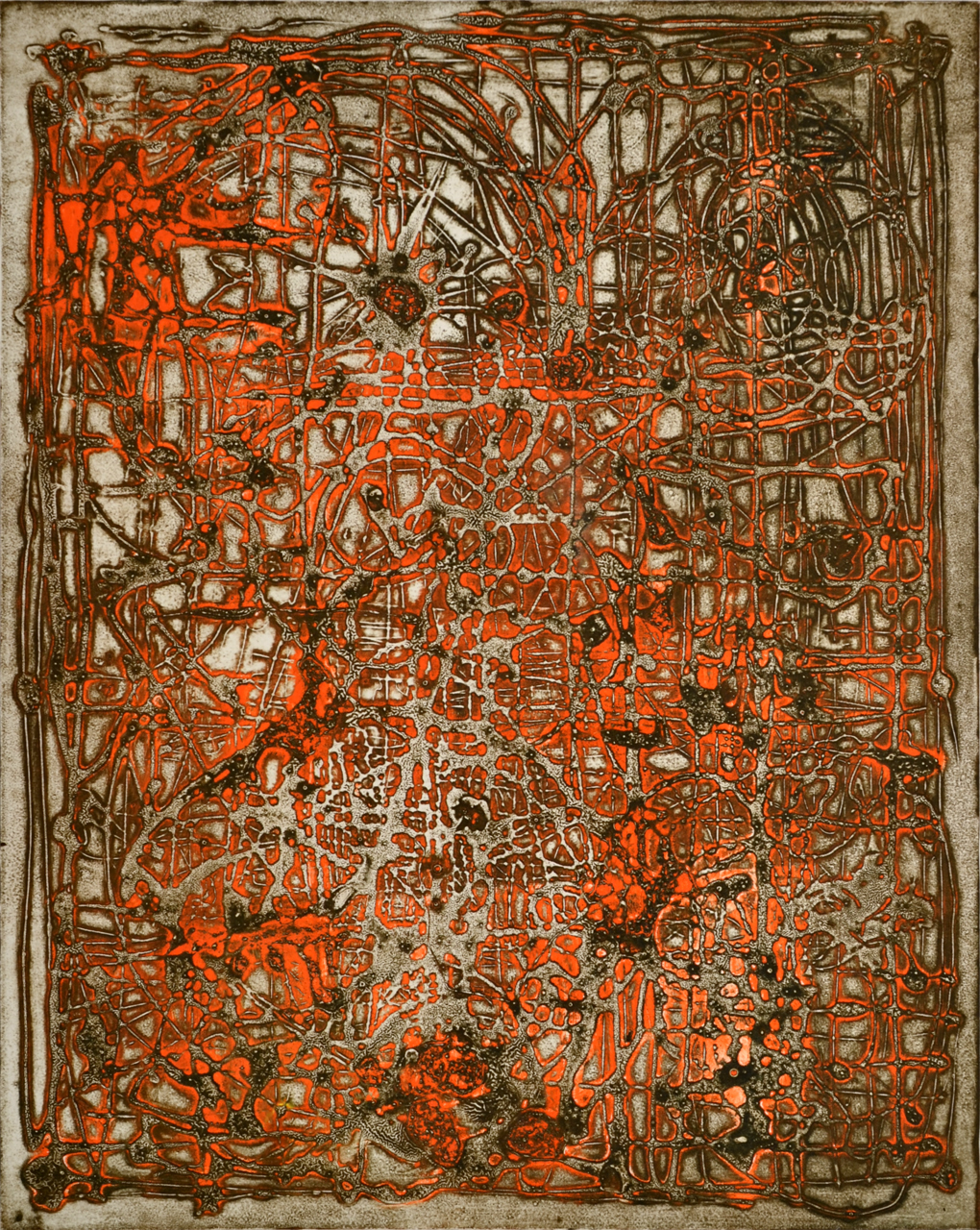 Oldřich Hamera, Bez názvu, strukturální monotyp, 47x38 cm, 2007